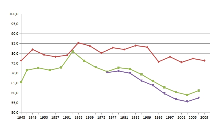 Valgdeltakelse ved norske valg etter 1945. Stortingsvalg Kommunevalg Fylkestingsvalg